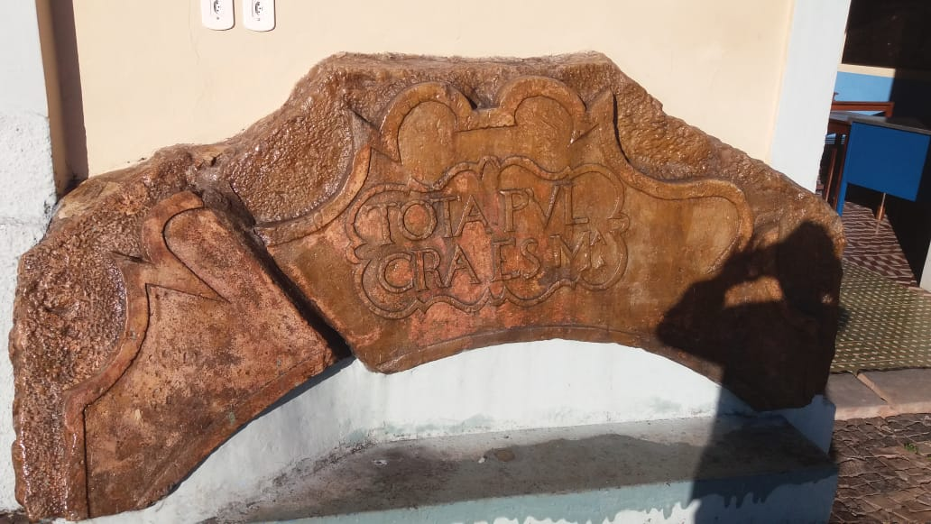 Pedro histórica da praça da igreja matriz de Alto Longá.